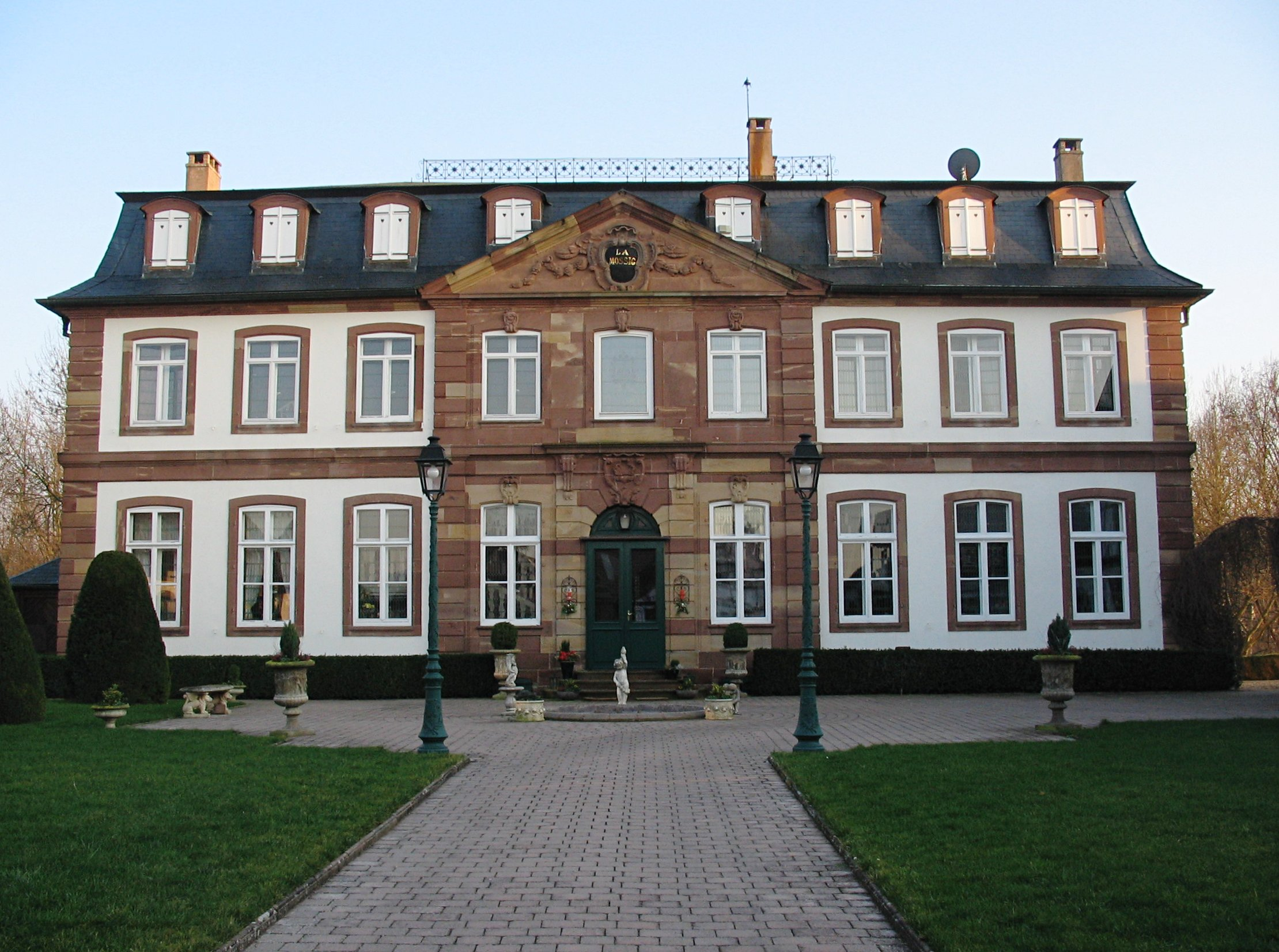 château d'Odratzheim (Bas-Rhin)